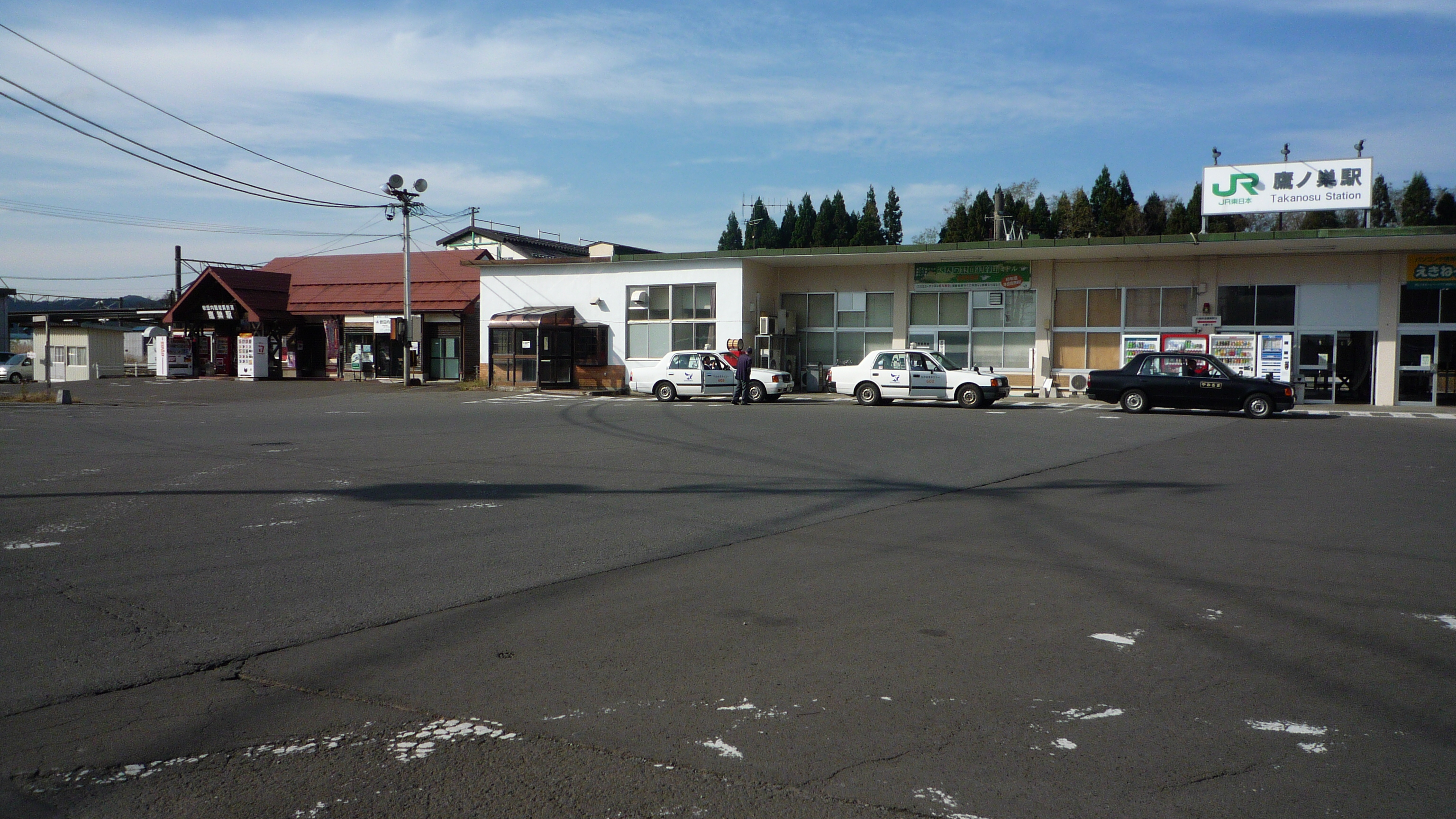 左：内陸線 鷹巣駅 右：JR 鷹ノ巣駅